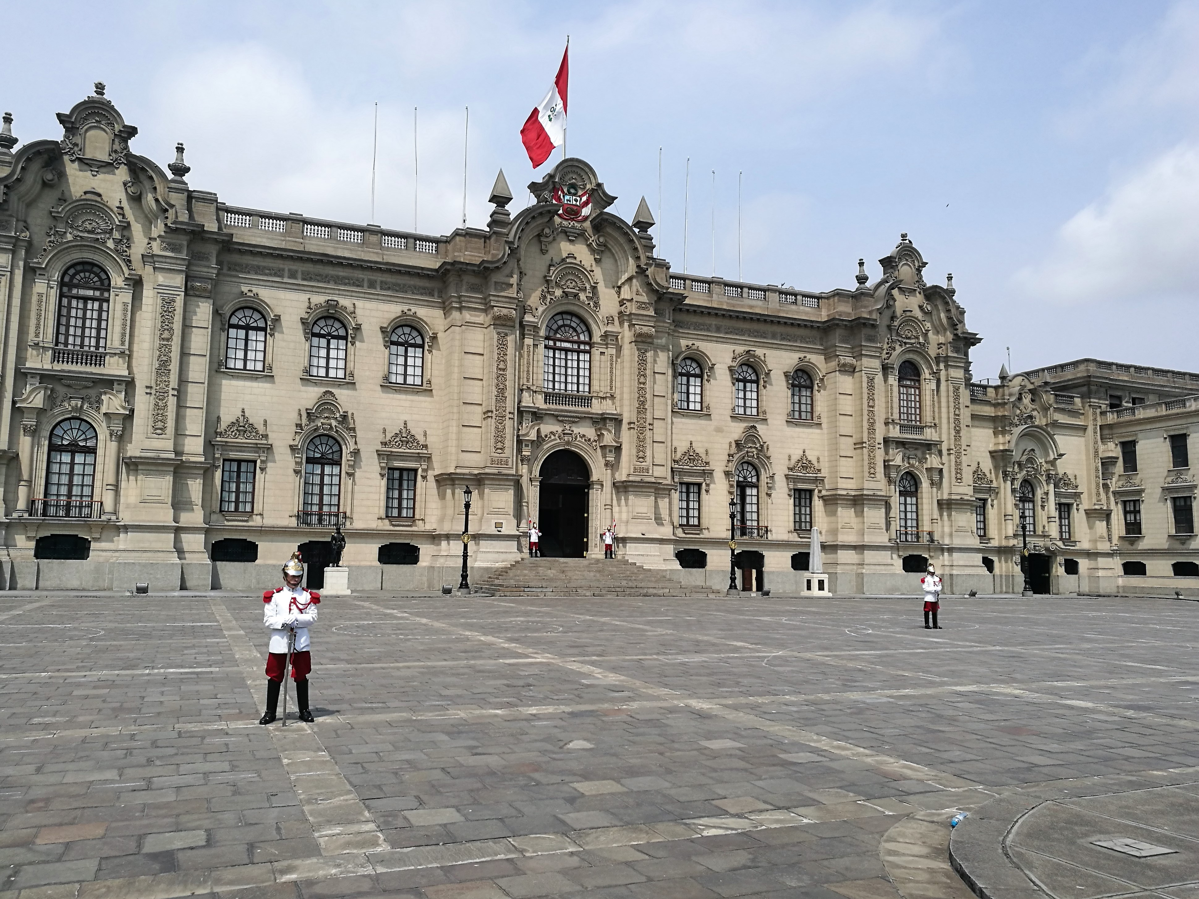 Palacio presidencial de Peru amb plaza mayor de lima